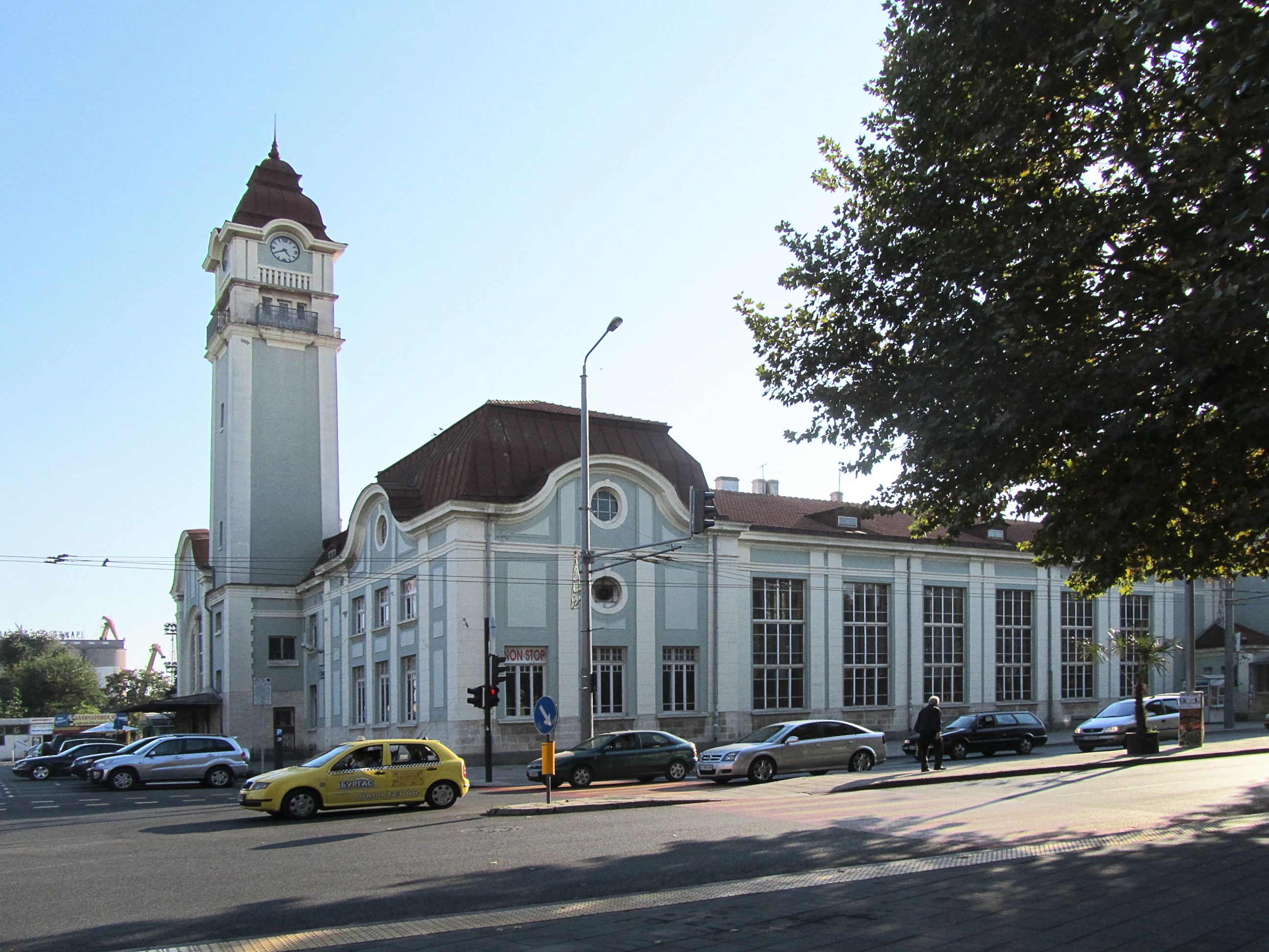 Централна Ж.П. гара, Бургас, България